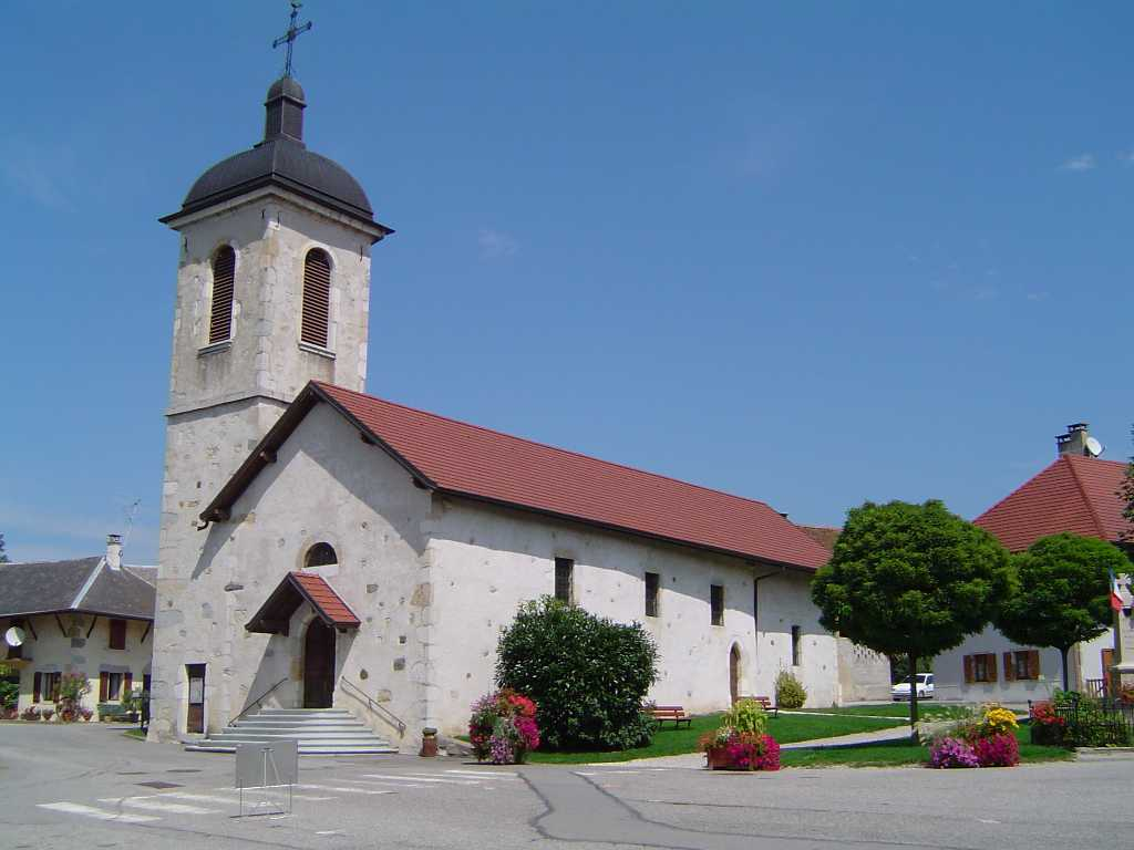 Eglise Saint-Martin de Chapeiry